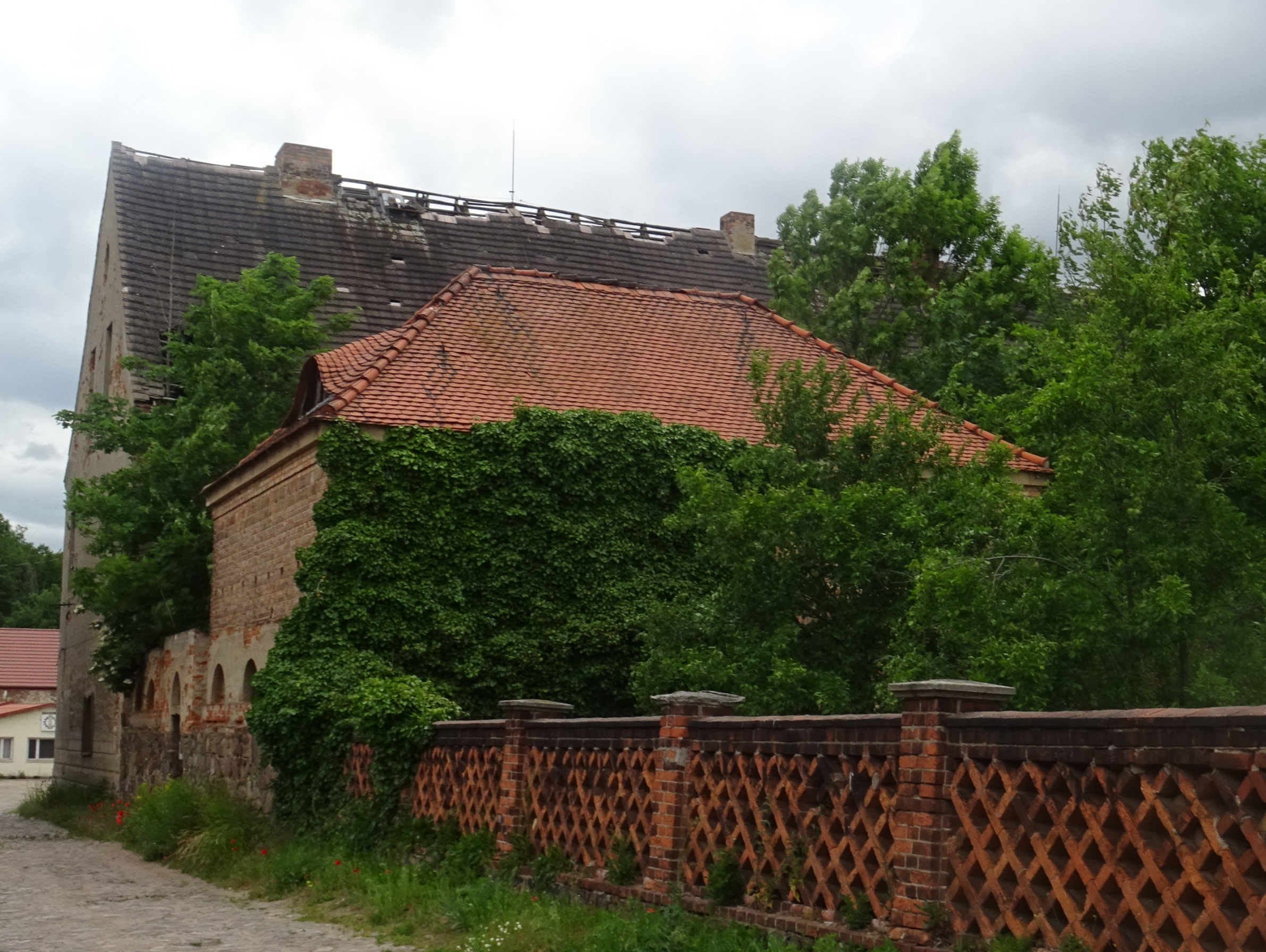 Dobritz,Ortsteil von Zerbst, ehemalige Gruftkapelle des Gutes, in den 1930er Jahren zu einem Wohnhaus umgebaut.